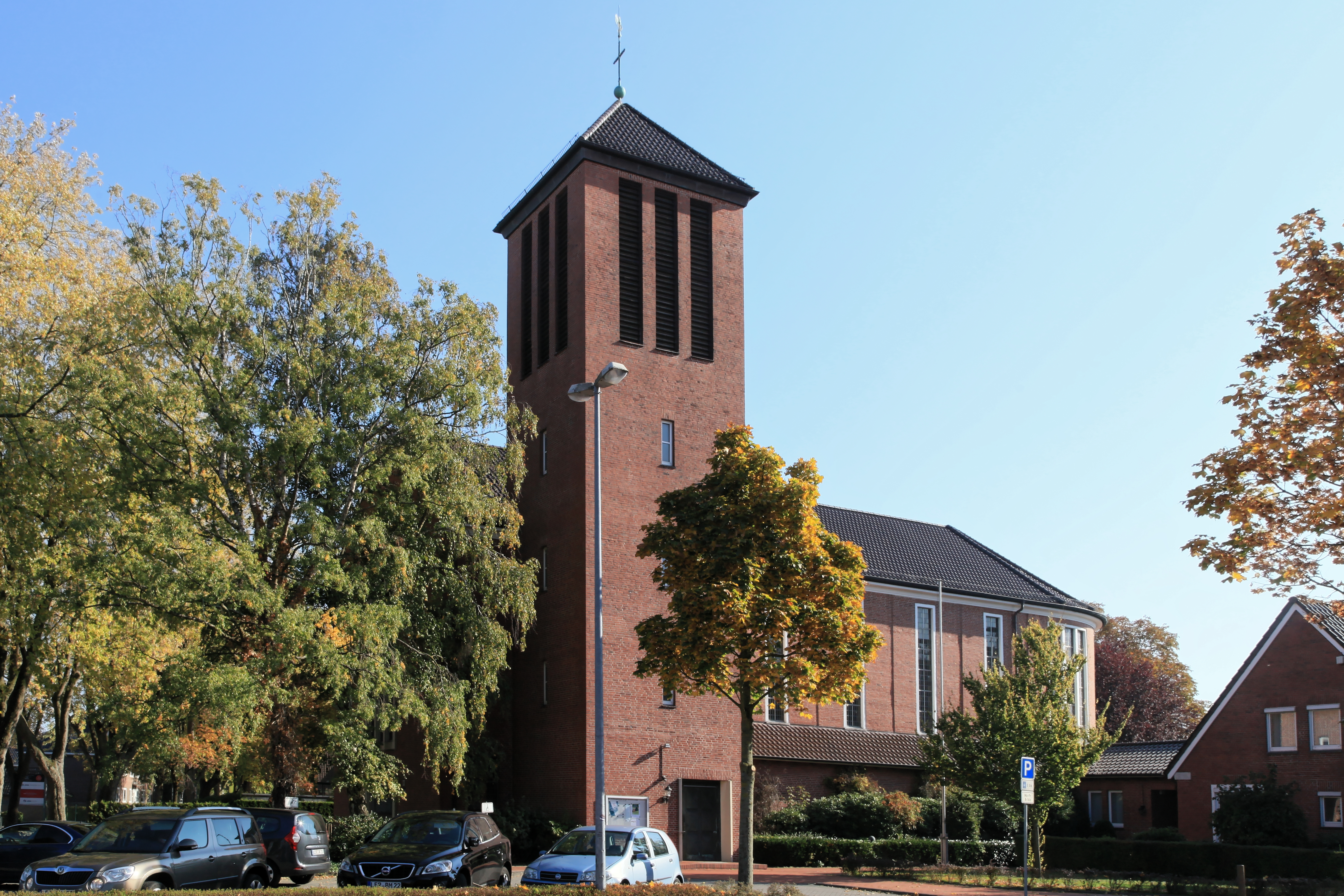 St. Marien, Bavinkstraße in Leer (Ostfriesland)